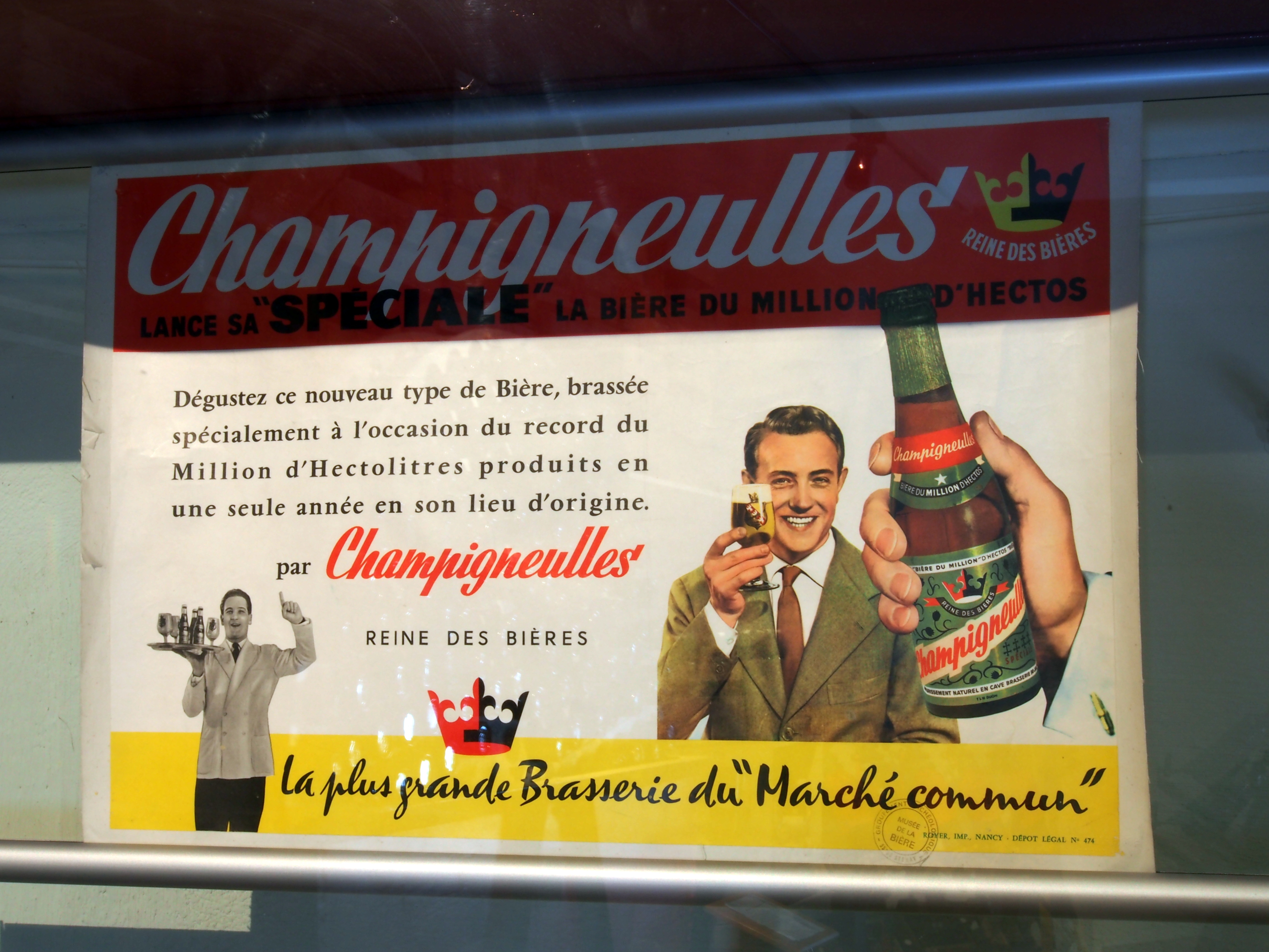 Musée Européen de la Bière - Beer poster - Champigneulles.